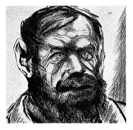 Karikatuur van Frederik van Eeden. Afkomstig uit Theo van Doesburg. De maskers af! Amsterdam: Vennootschap Letteren en Kunst, [1910], plaat XIII.